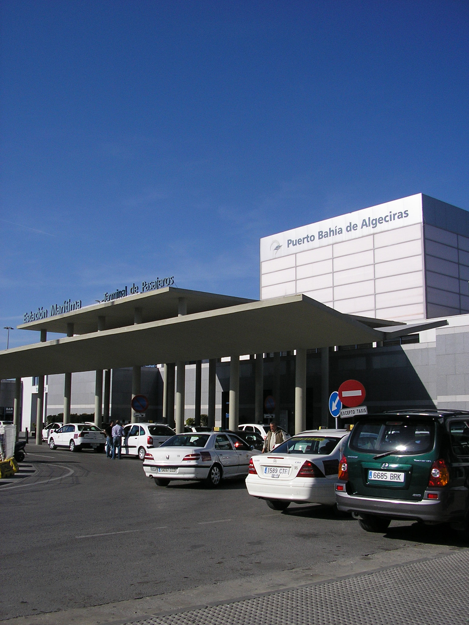 Terminal de pasajeros del puerto de Algeciras, Andalucía, España